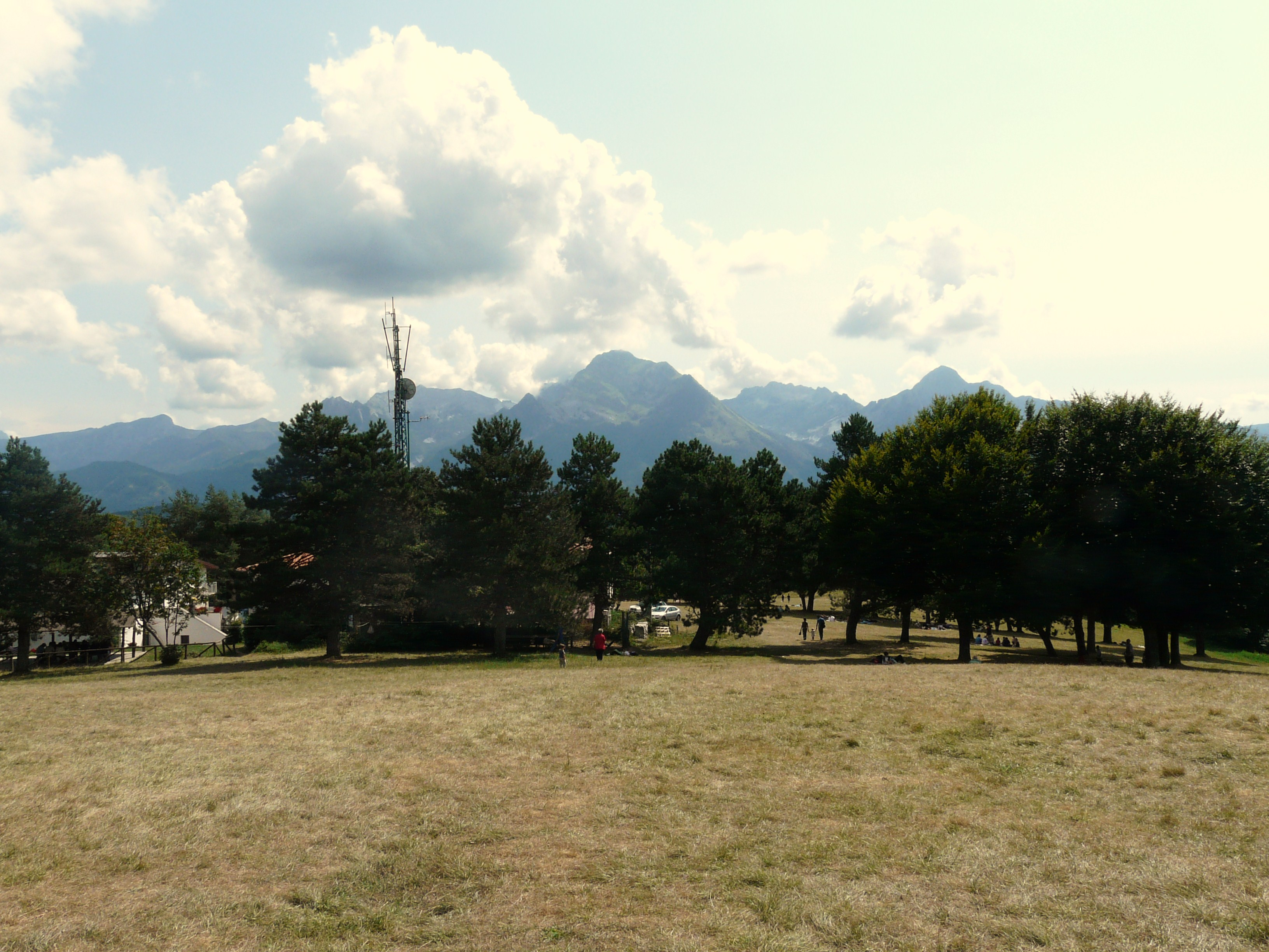 Monte Argegna, Giuncugnano, Toscana, Italia